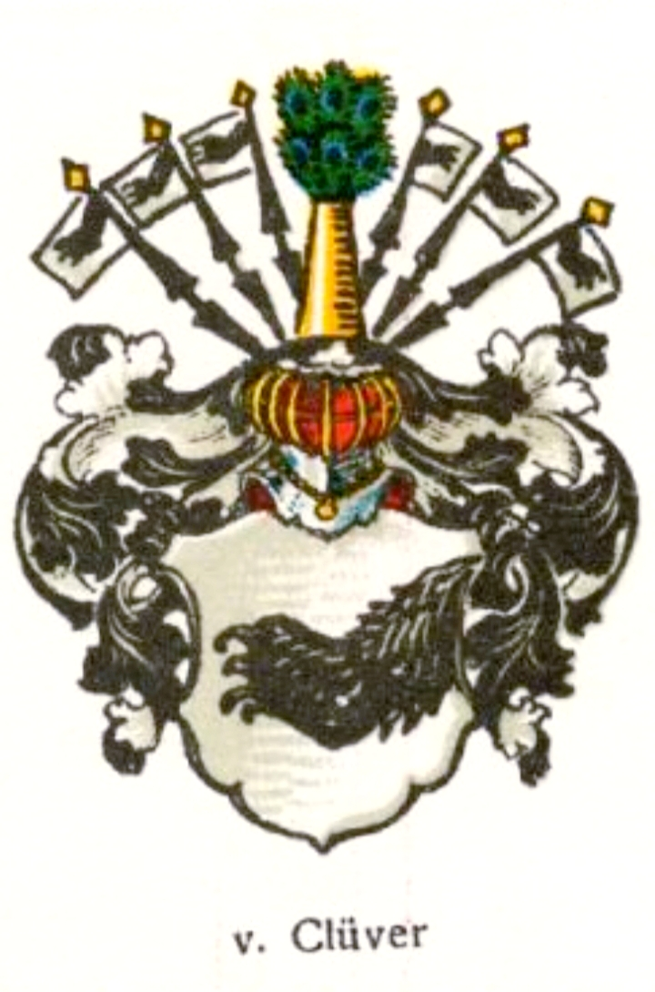 Wappen derer von Clüver, bremen-verdischer Uradel [1]